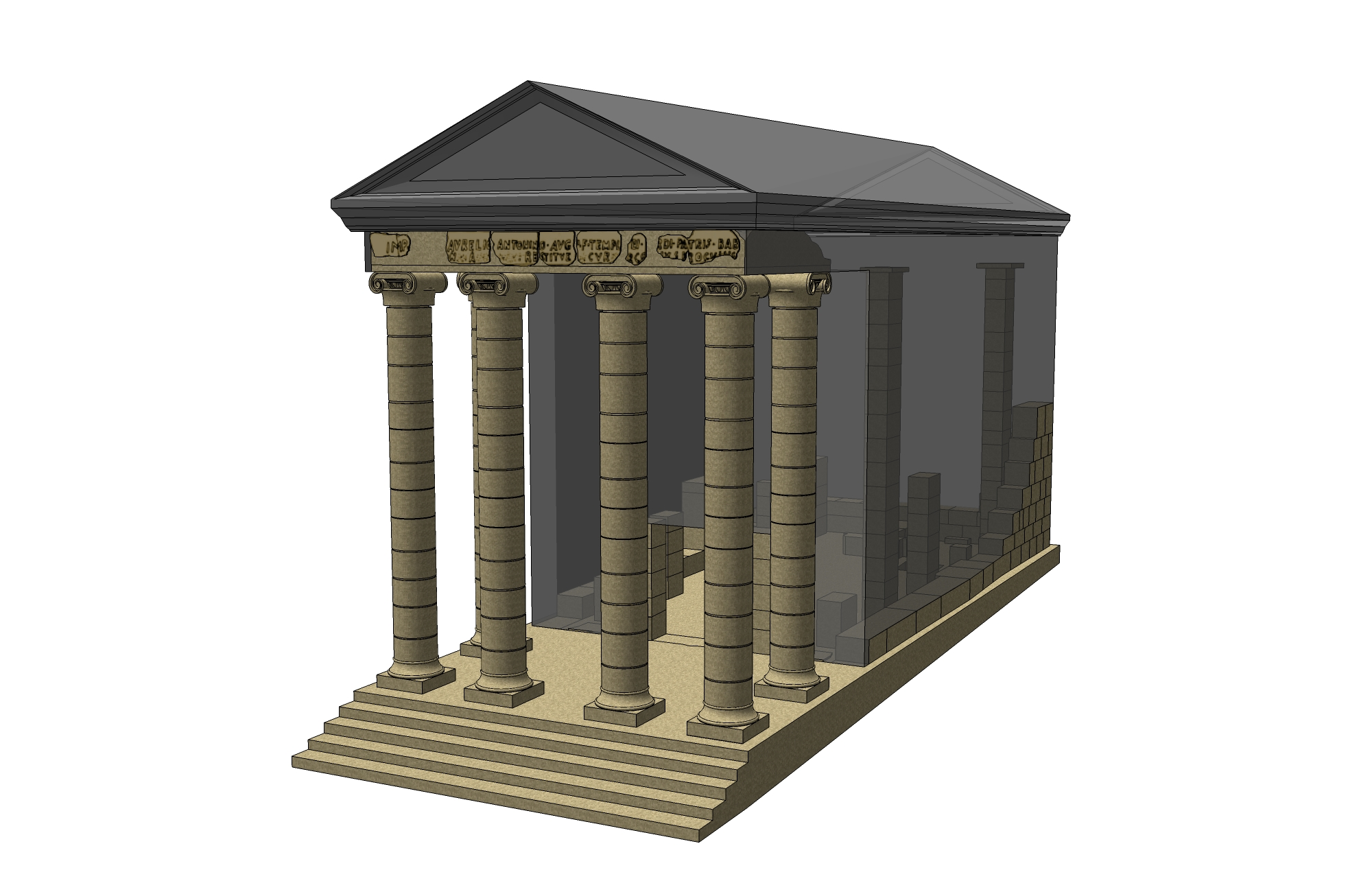 Modello tridimensionale del Tempio punico-romano di di Antas, dedicato alla divinità locale "Sardus Pater Babay",Fluminimaggiore - Sardegna, Italia.